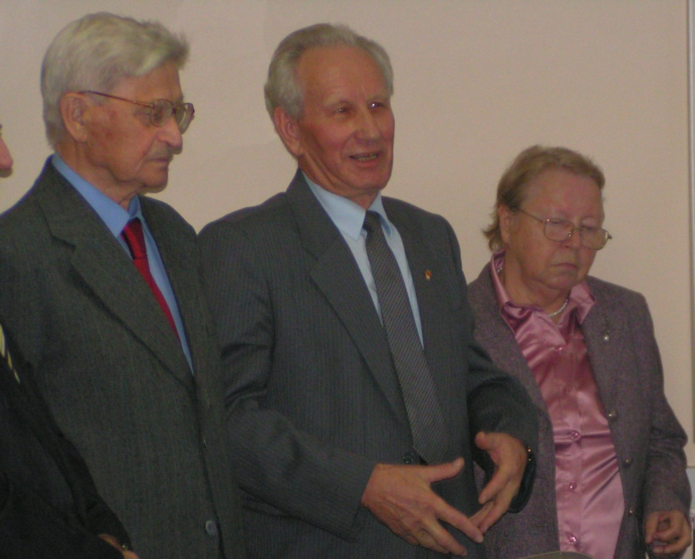 рабочая встреча в землячестве